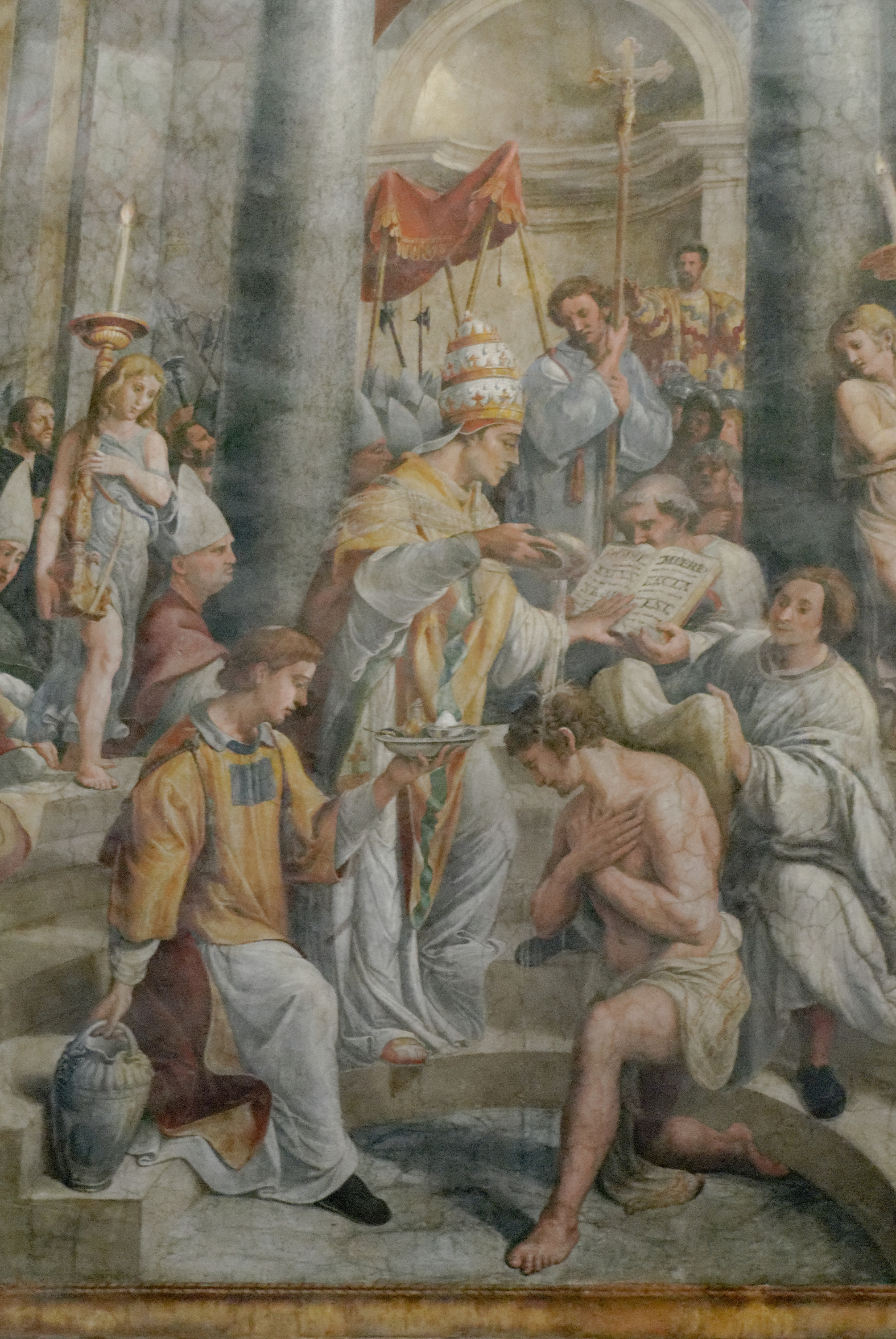 Il Battesimo di CostantinoBaptism of Constantinetitle QS:P1476,it:"Il Battesimo di Costantino" label QS:Lit,"Il Battesimo di Costantino" label QS:Lfr,"Le baptême de Constantin" label QS:Len,"Baptism of Constantine"